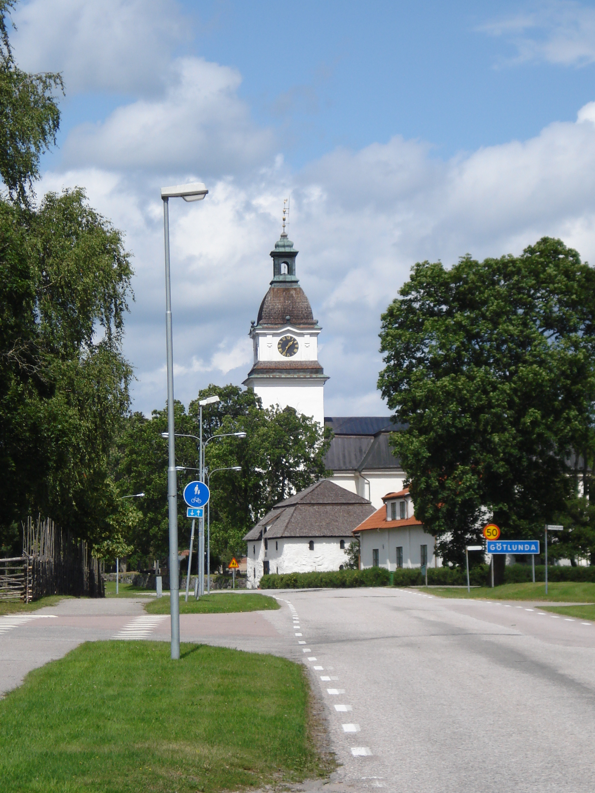 Götlunda (Arboga kommun)